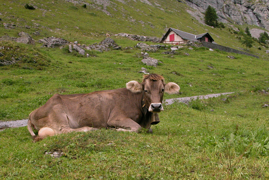 Traditionelle Rinderrasse der Alpen: Braunvieh